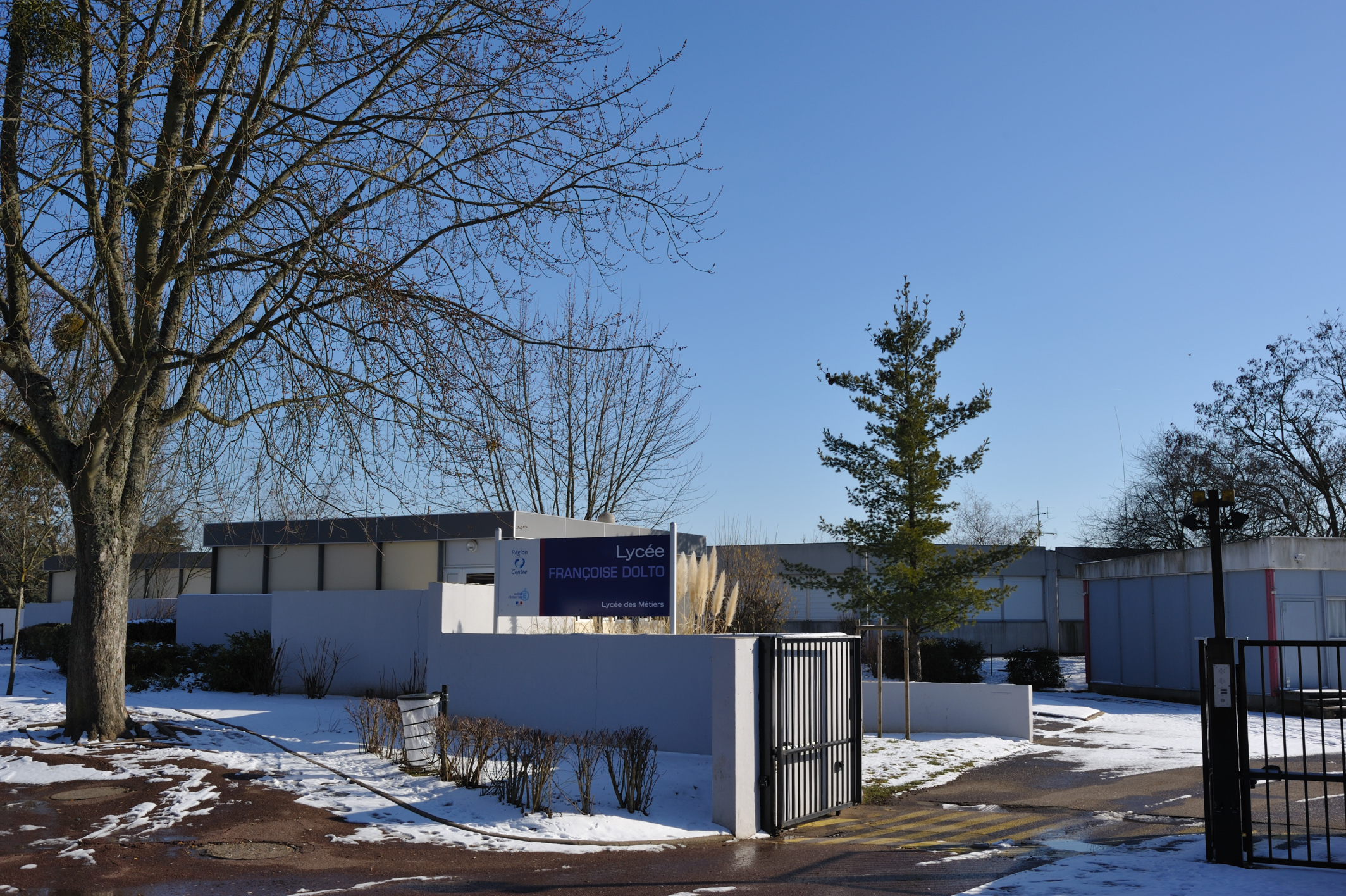 Lycée professionnel Françoise Doltot, Olivet, Loiret, France